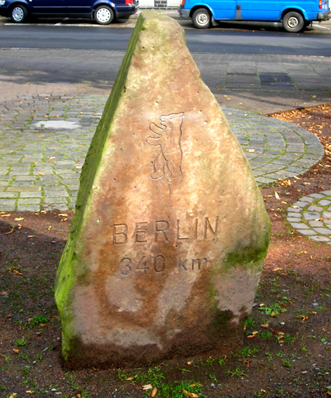 Meilenstein am Neustädter Platz in Uslar (Frühjahr 2007).